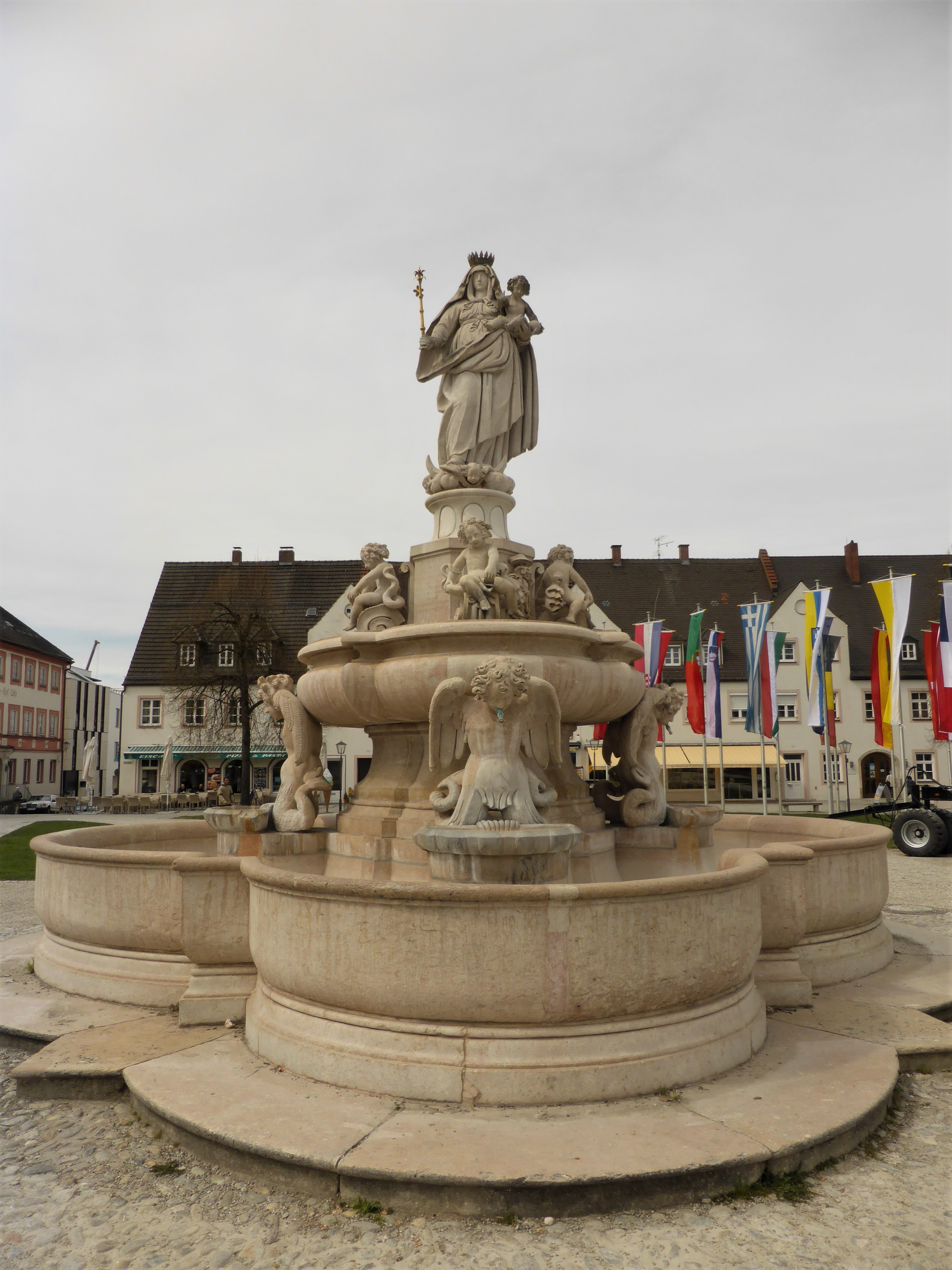 Sogenannter Marienbrunnen in Altötting am Kapellplatz; Barocke Anlage von Santino Solari, 1637.This is a photograph of an architectural monument.